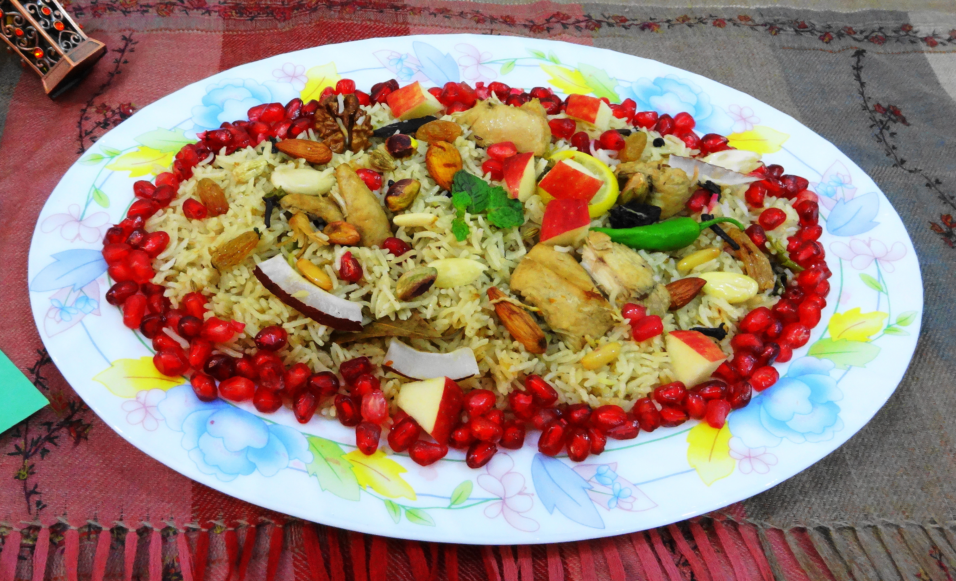 کشمیری پلاؤ